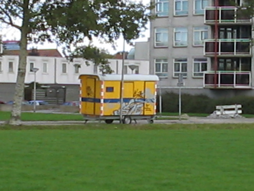 bouwkeet met graffiti